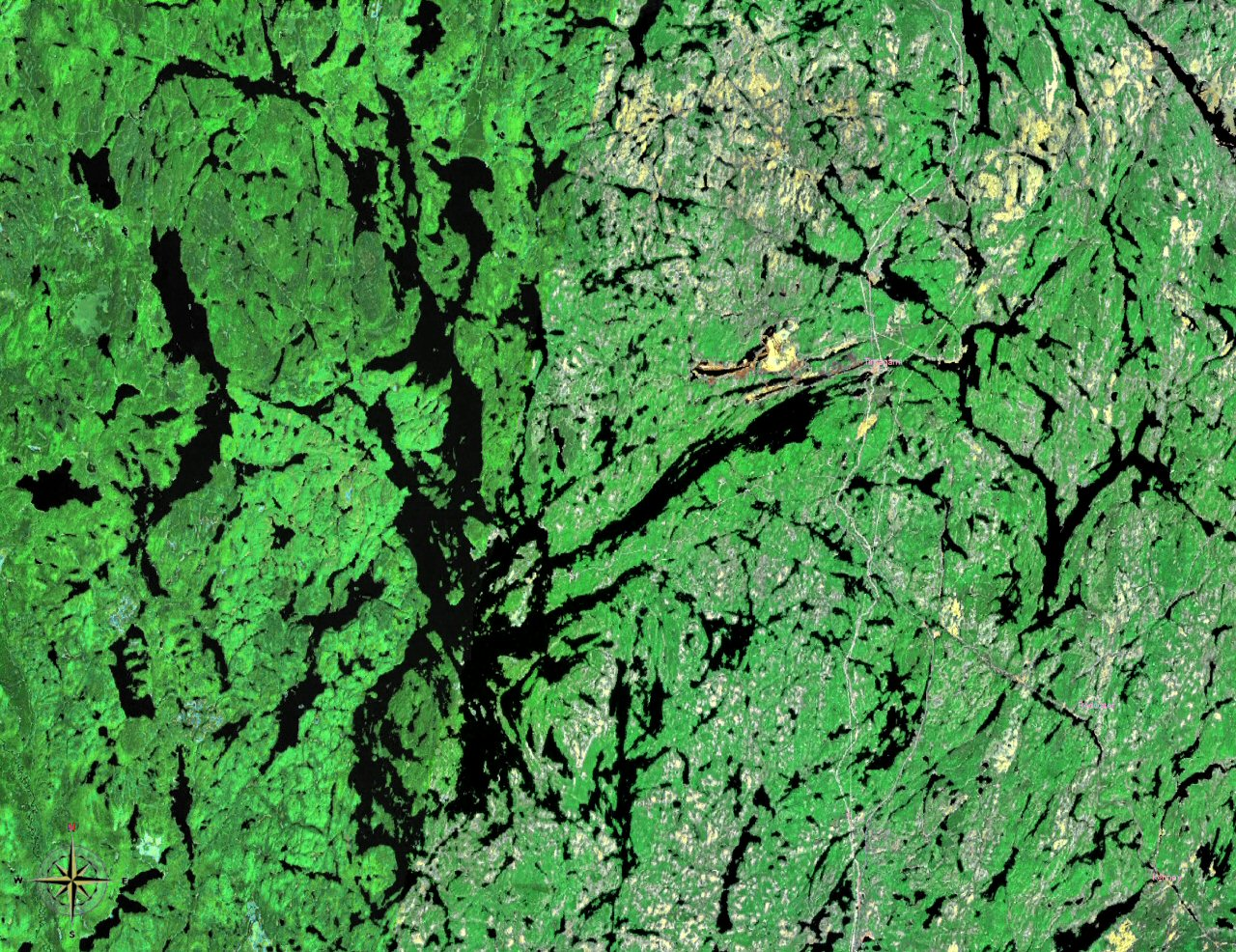 Lake Temagami, Ontario, Canada.